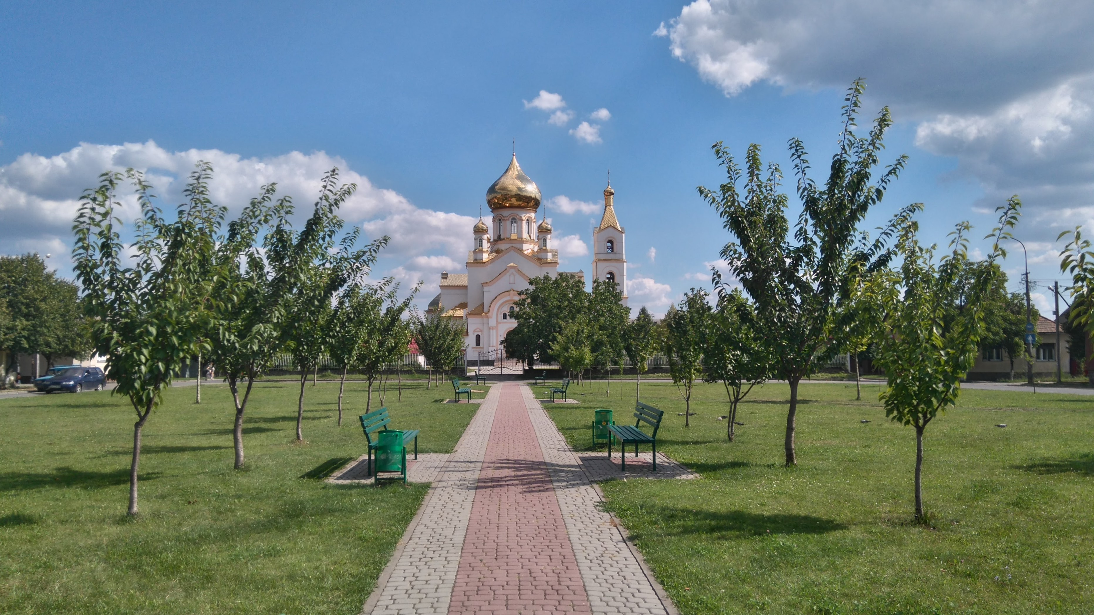 Церква Різдва Пресвятої Богородиці